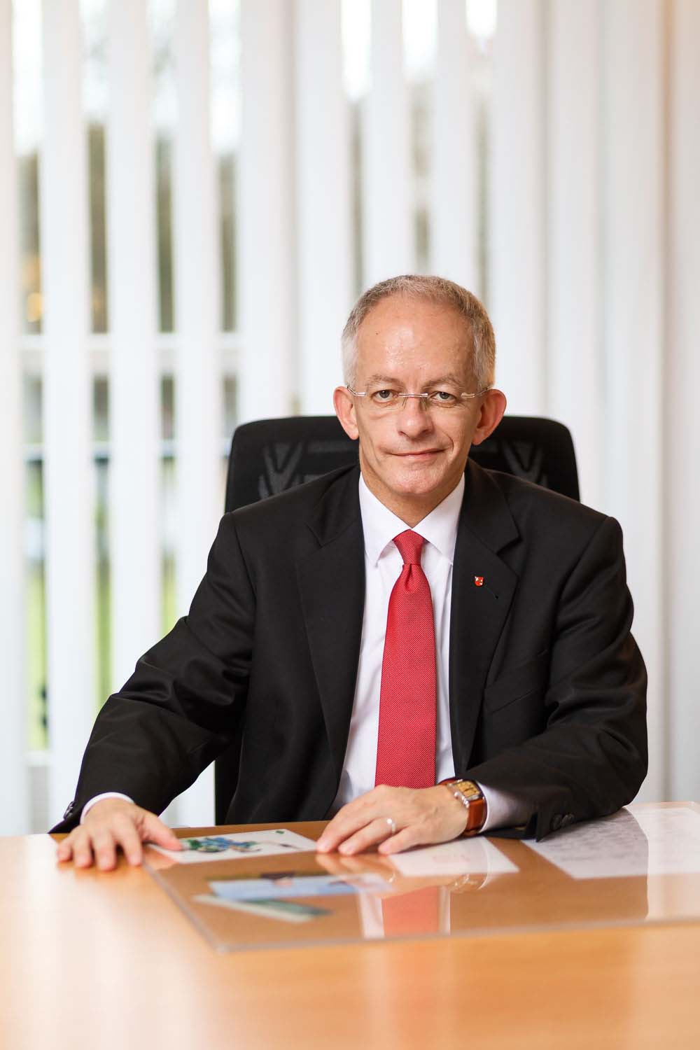 Jörg Mielke, Chef der Niedersächsischen Staatskanzlei, an seinem Schreibtisch in der Niedersächsischen Staatskanzlei.